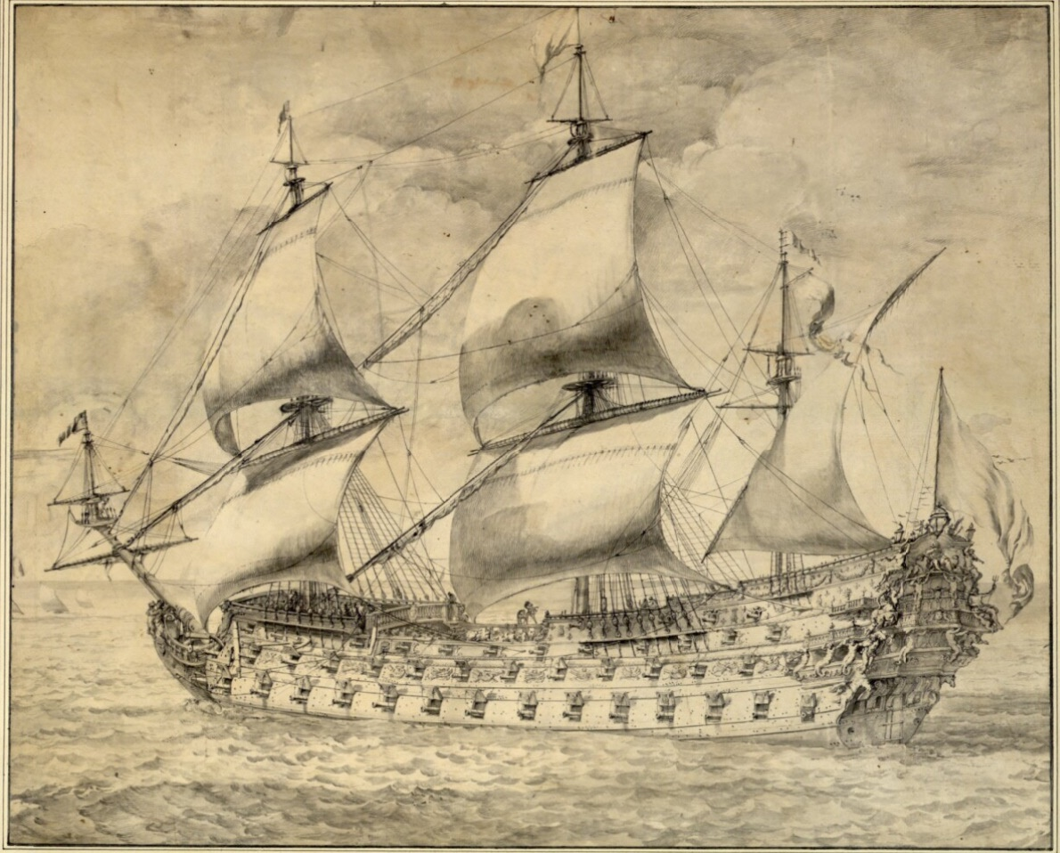 Dessin sans date de Pierre Puget représentant sans doute le premier Royal Louis construit en 1668. Trois-Ponts de plus de 100 canons. Vaisseau dit de premier rang.